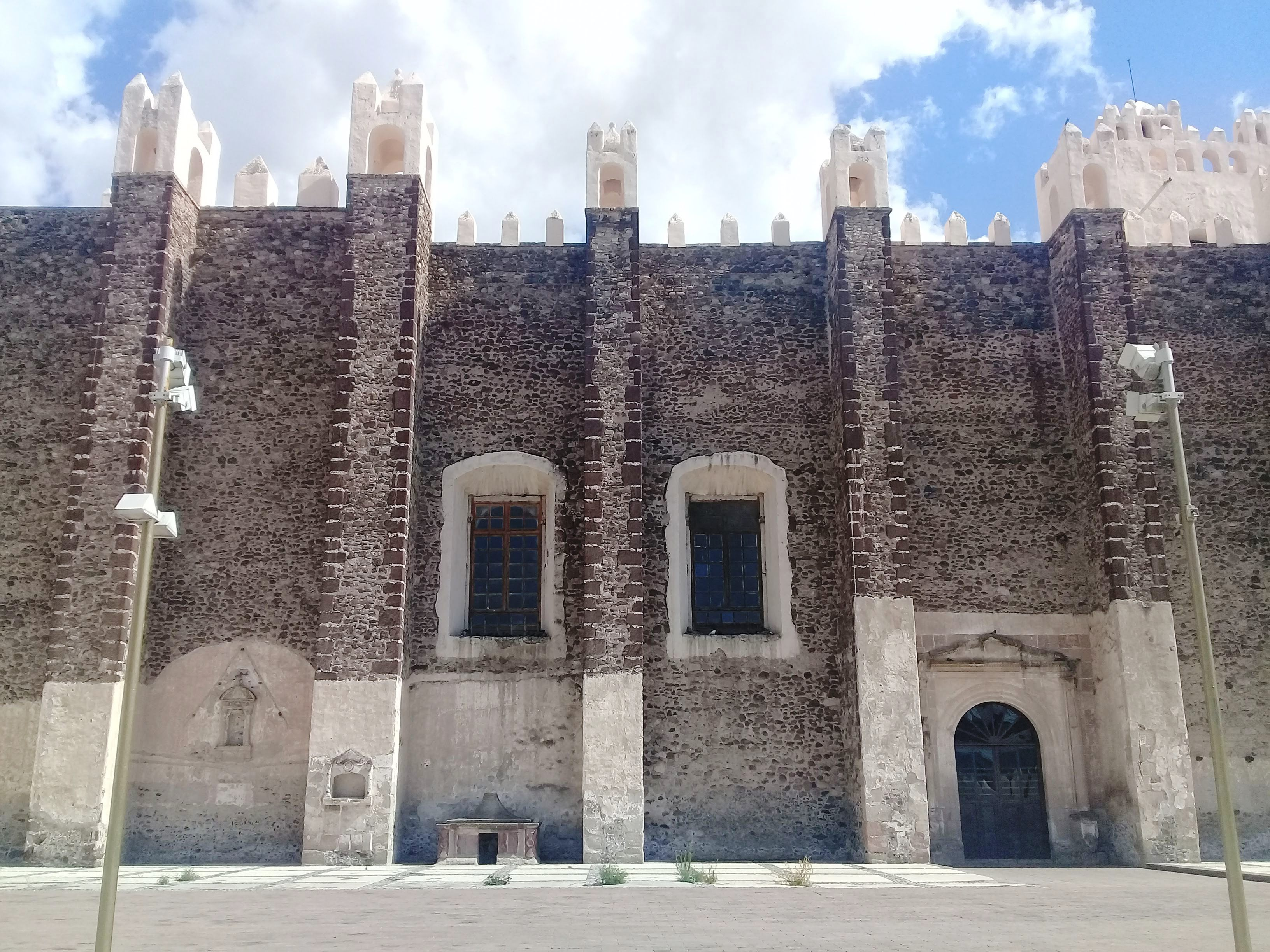 Templo y exconvento de San Nicolás de Tolentino (Actopan).